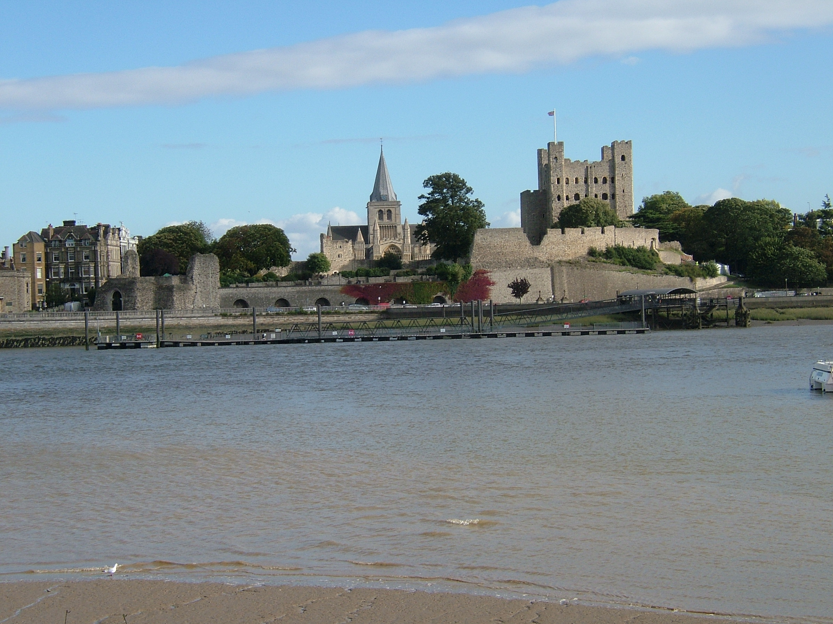 Rochester